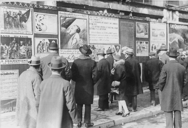 Der Auftakt zu den kommenden französischen Wahlen! Propaganda-Plakate aller Parteien Frankreichs in den Strassen Paris.